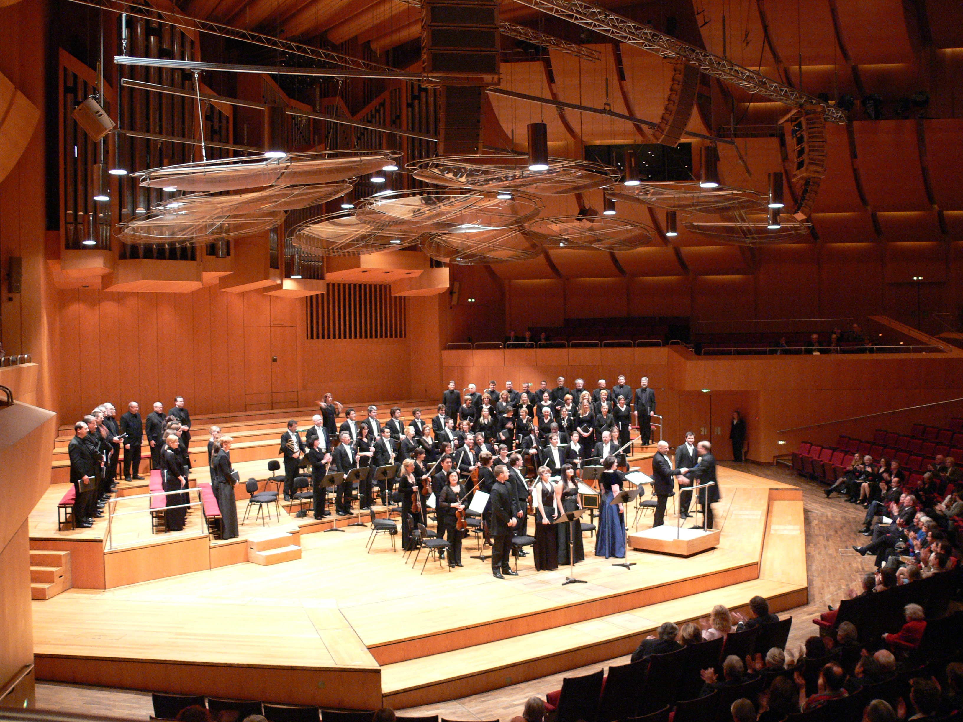 Solisten, Bach-Chor München und Bachkollegium München nach einem Konzert in der Philharmonie im Gasteig, München